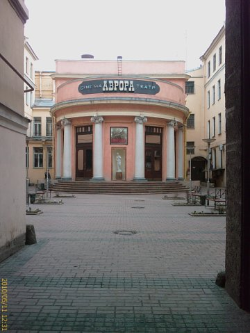 St. Petersburg